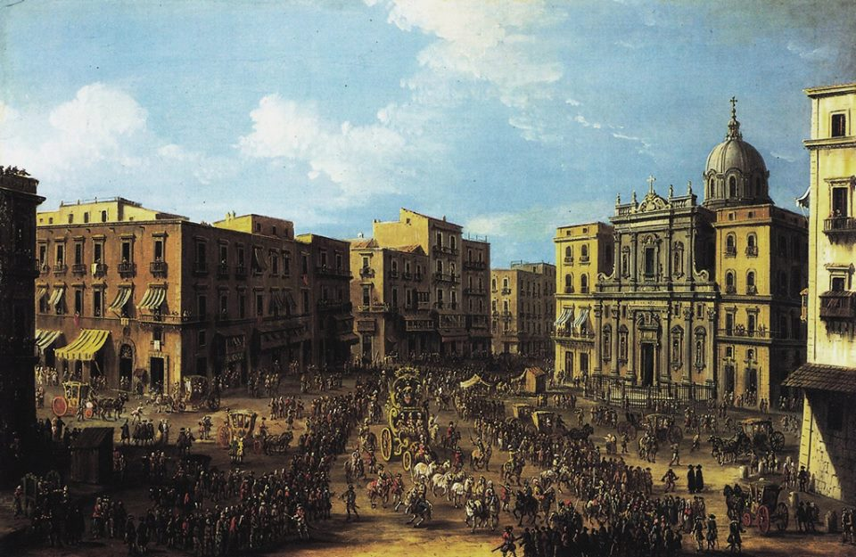 Antonio Joli - Carnevale a Napoli in piazza San Ferdinando. Collezione privata.